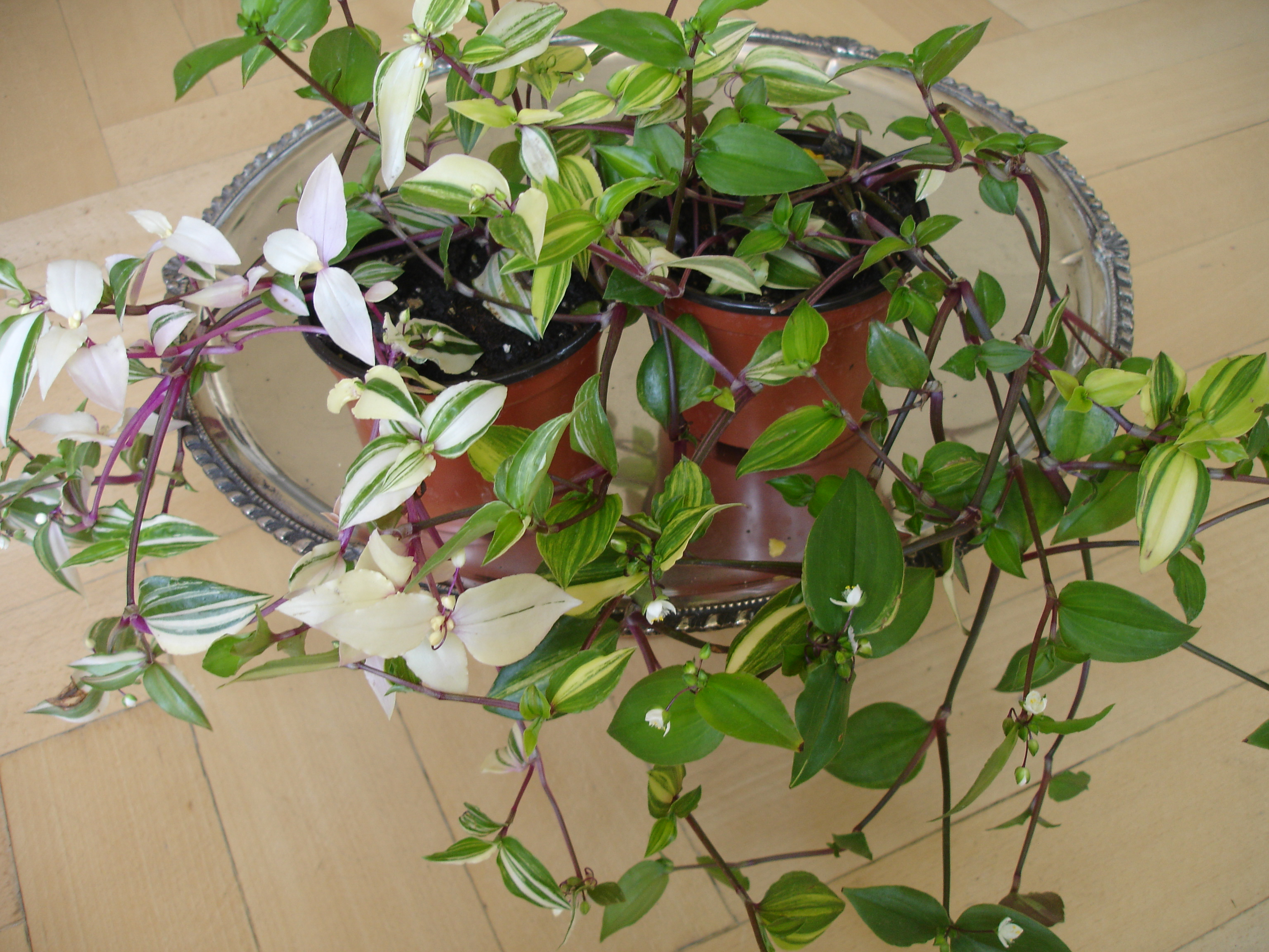 Tradescantia fluminensi, two distinc Variegata cultivars